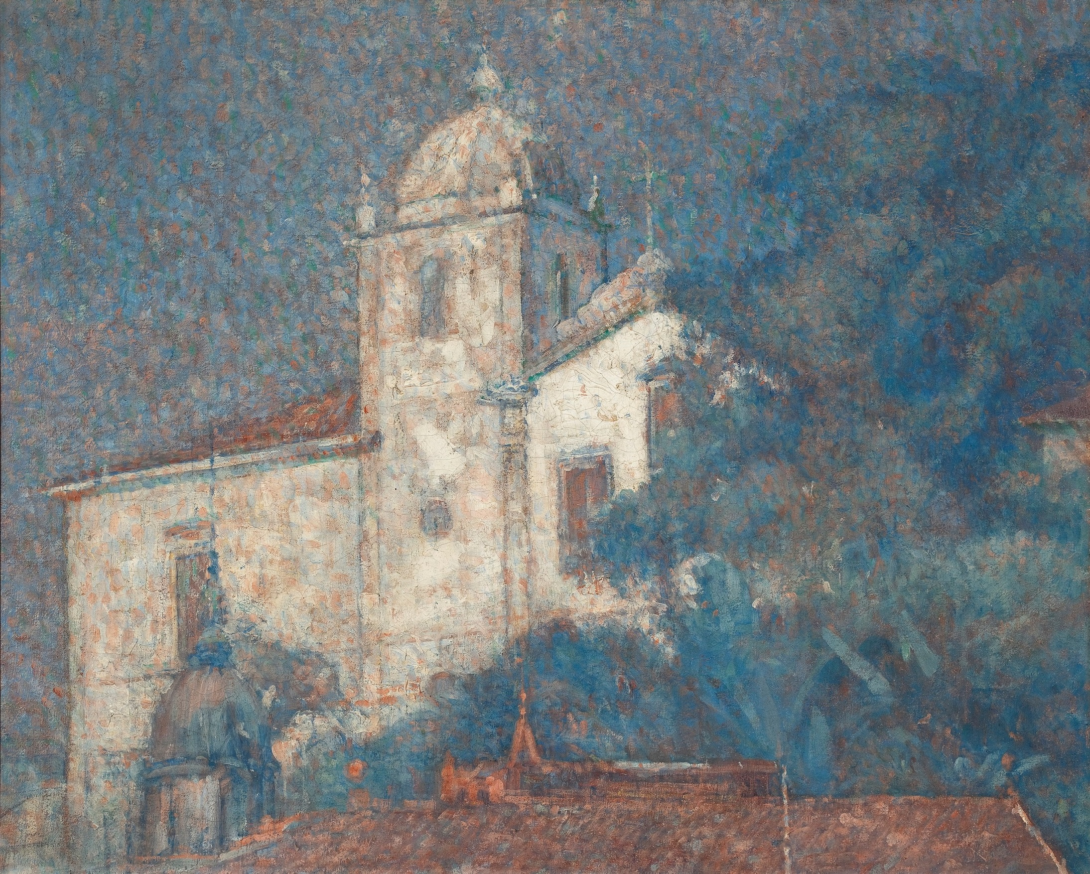 Obra do Projeto Eliseu Visconti